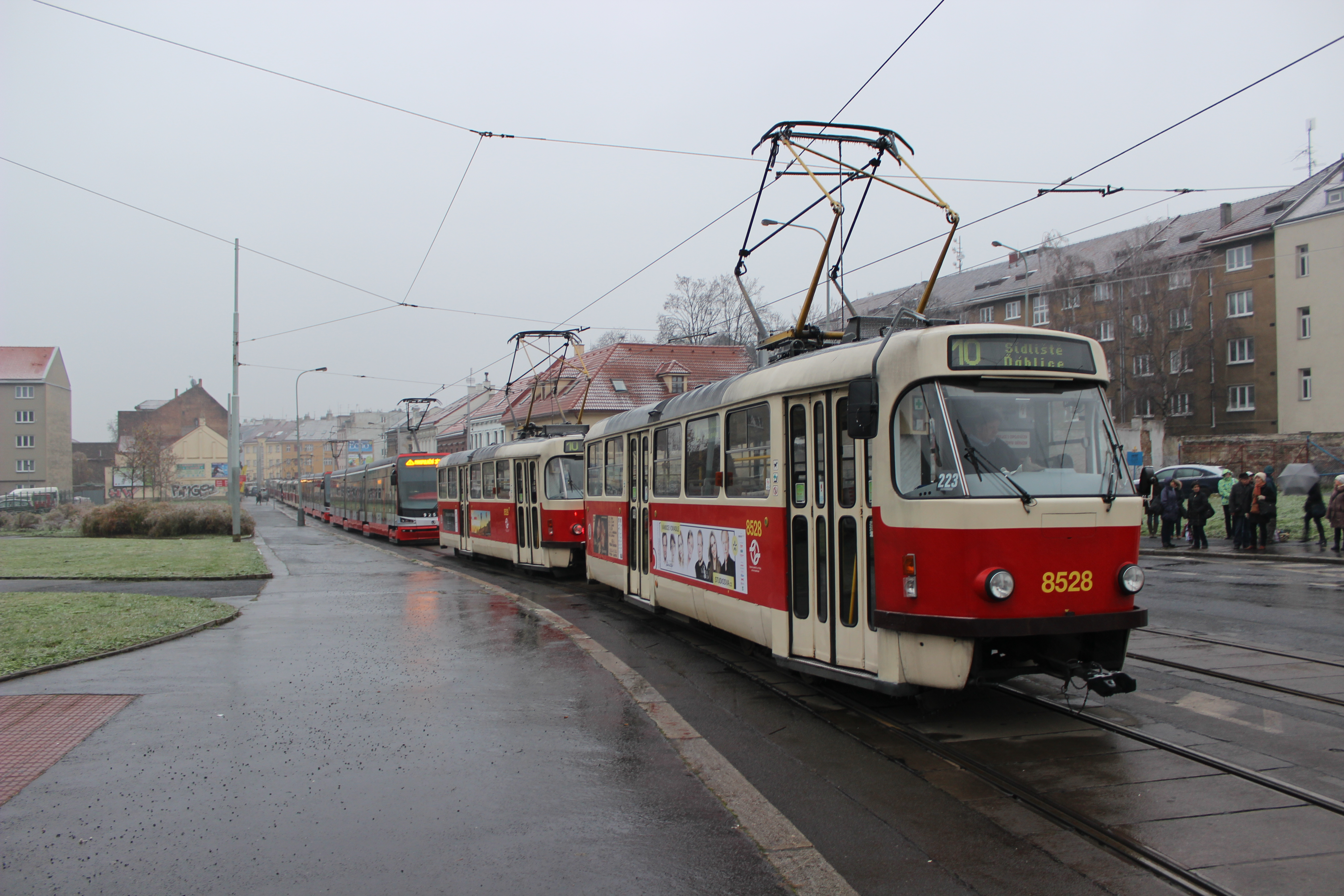 Tramvaje odstavené v pražské Zenklově ulici (pohled jihovýchodním směrem).